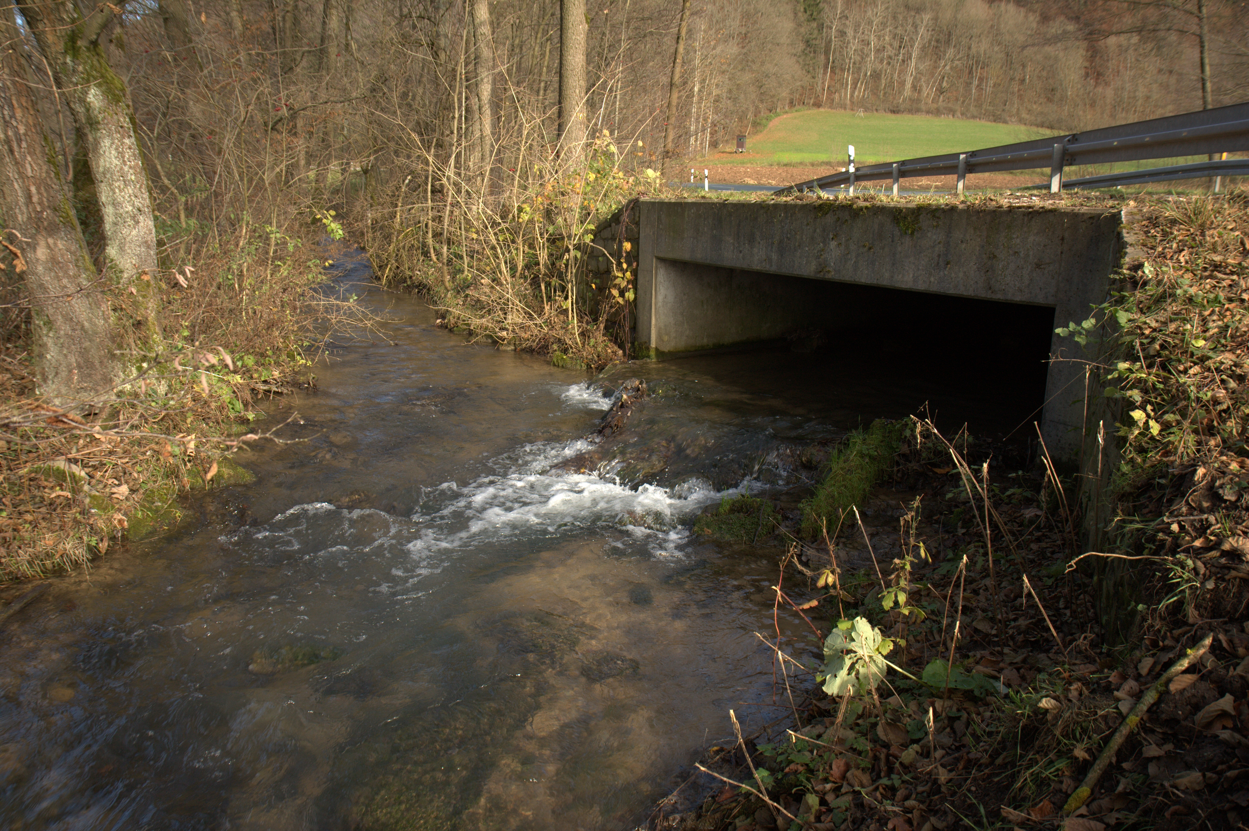 Zusammenfluss des Naiferbaches (Links) und dem Ittlinger Bach zur Schnaittach